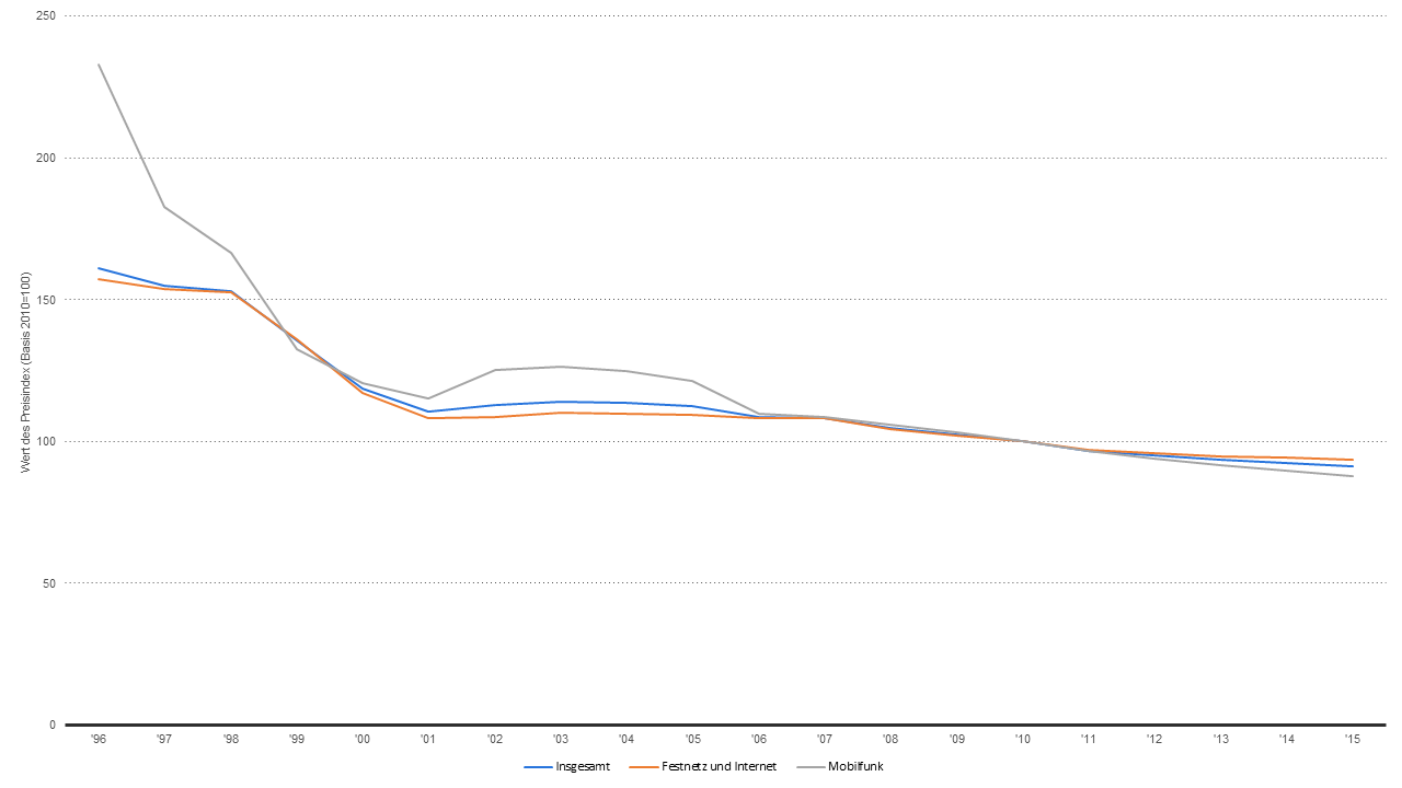 Die Abbildung zeigt einen Preisindex für alle Telekommunikationsdienstleitungen und jeweils einen für Festnetz sowie einen für Mobilfunk.